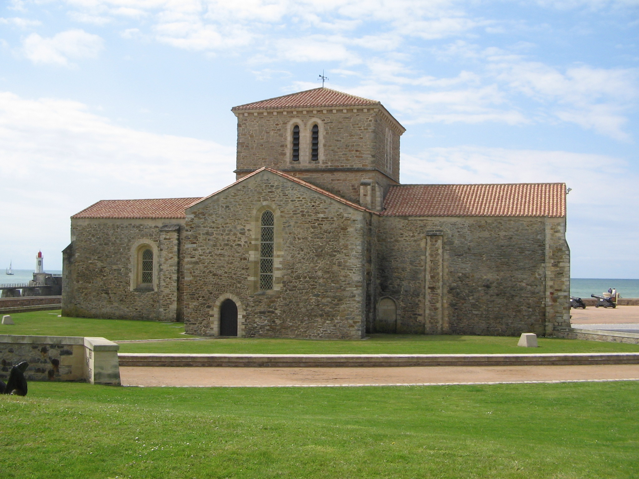 Le Prieuré St Nicolas, situé dans le quartier de La Chaume aux Sables d'Olonne en France